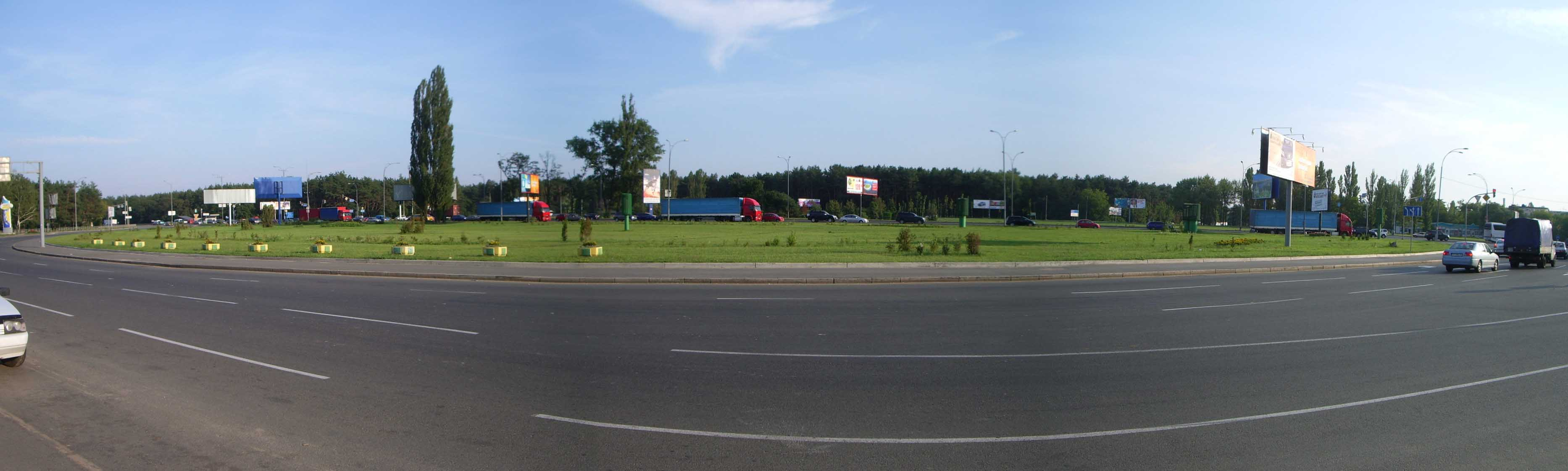 Панорама_харківська_площа.jpg: панорама площі